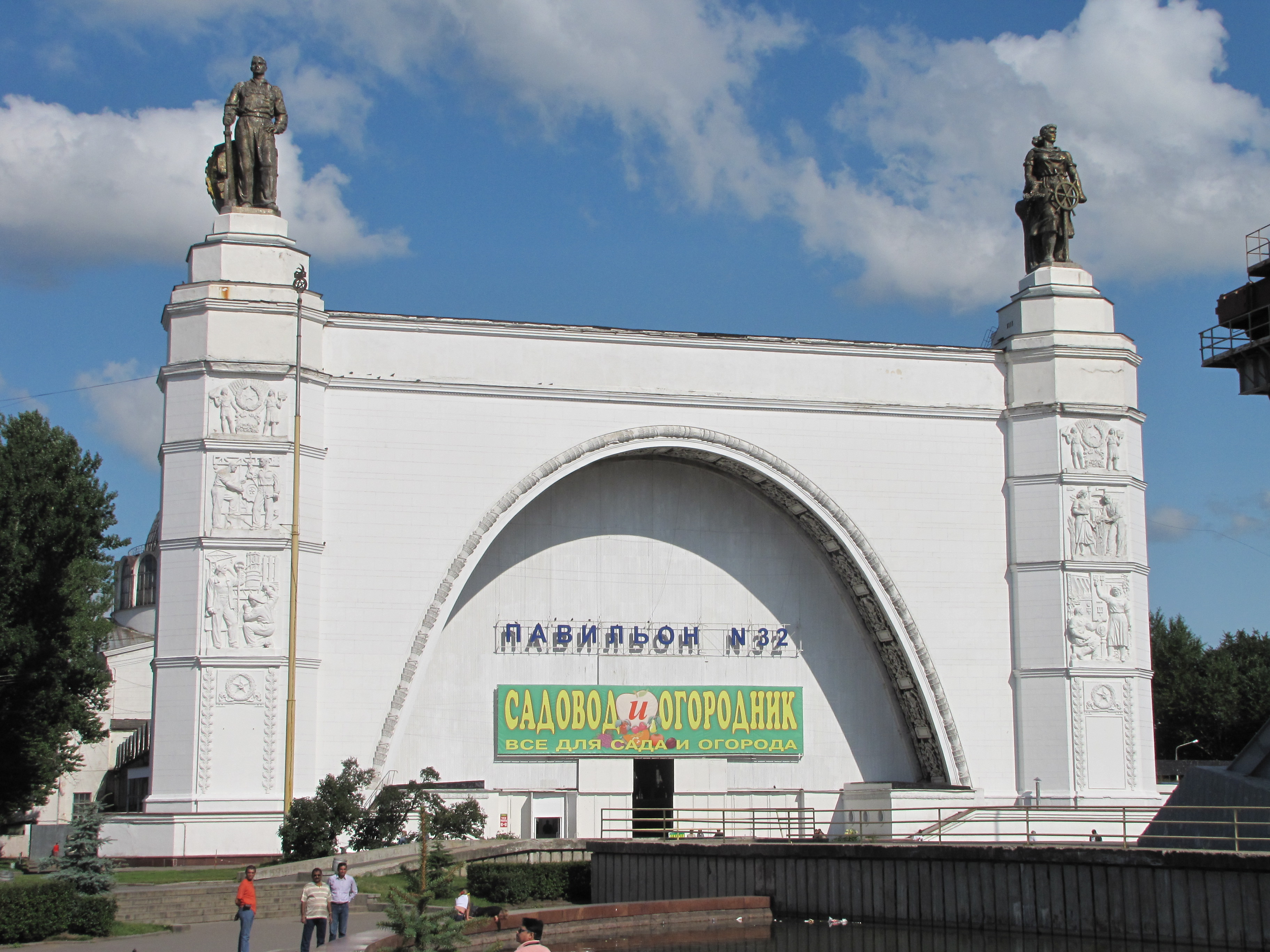 Павильон "Космос" - один из самых замечательных и запоминающихся сооружений ВВЦ.